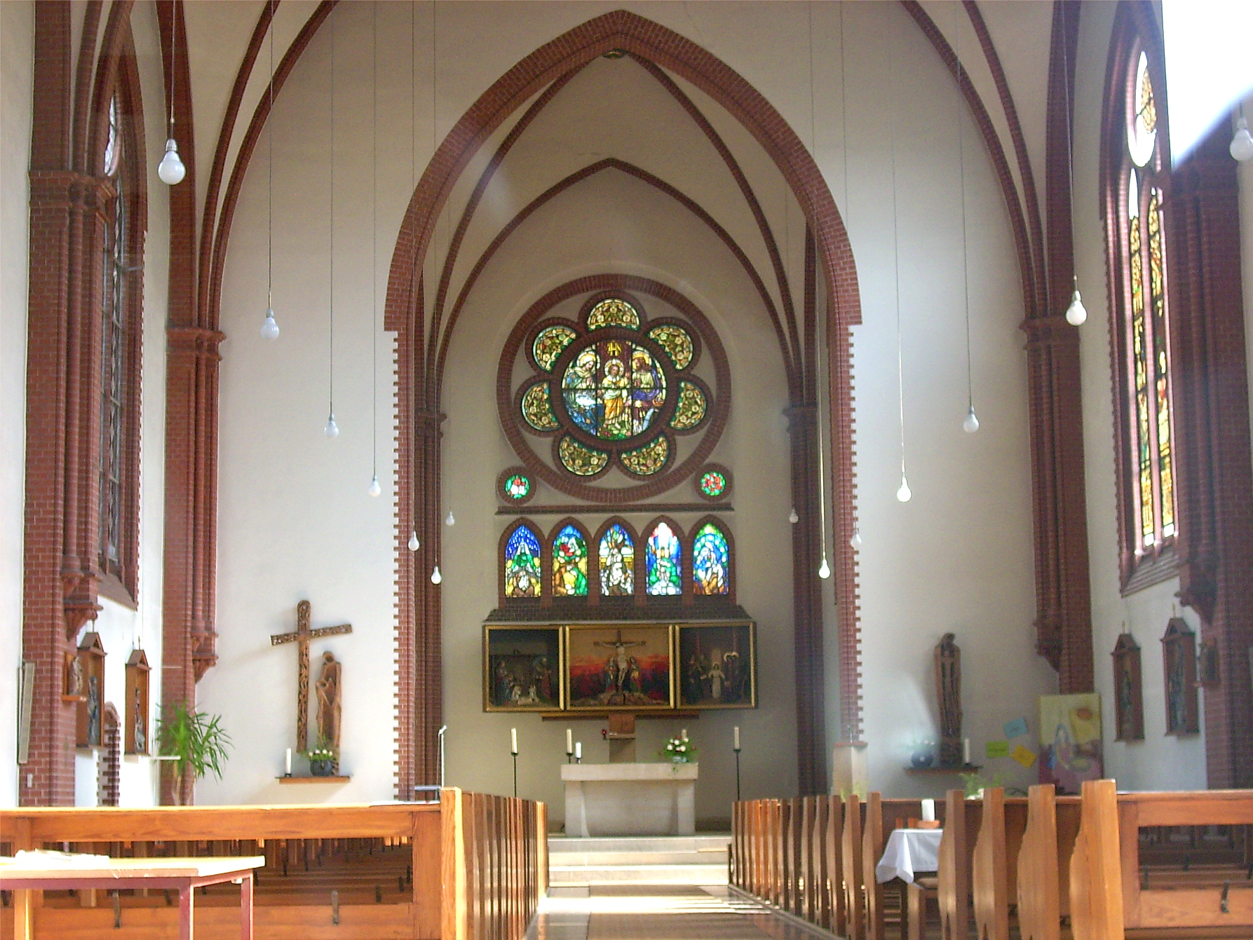 katholischen Kirche Heilige Familie in Hoyerswerda